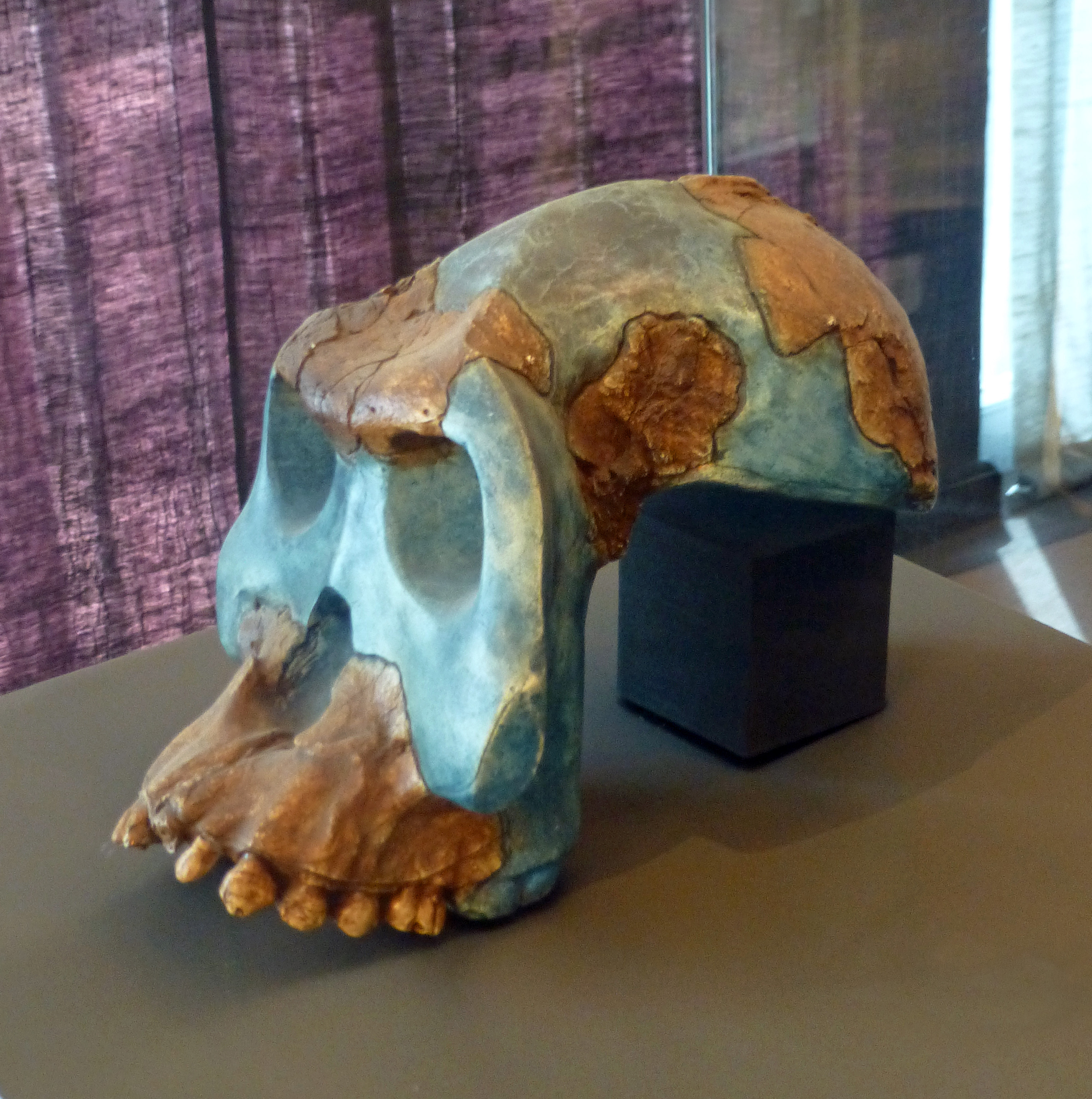 Addis Abeba, Musée national d'Ethiopie : crâne reconstitué d'Australopithecus garhi à partir d'éléments trouvés en 1997 (Awash, région Afar). 2,5 millions d'années.